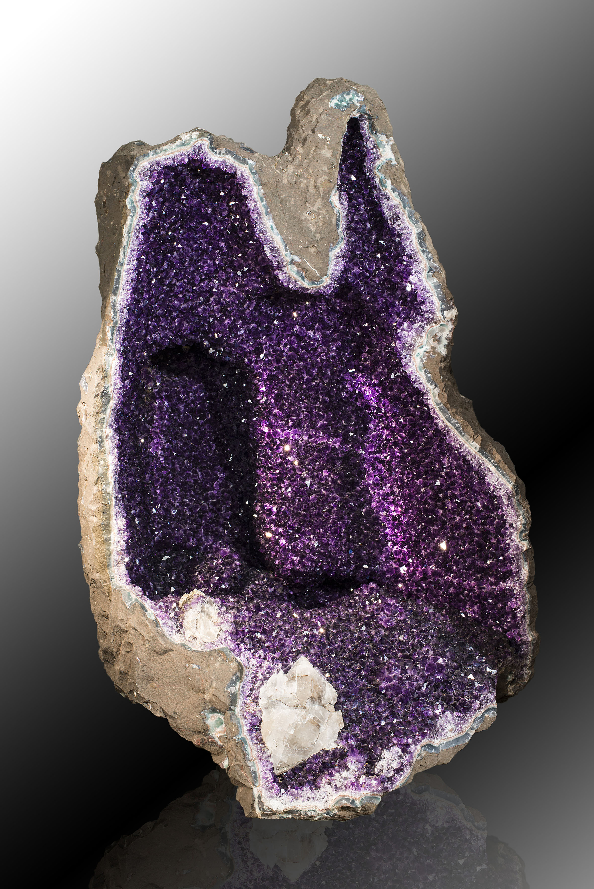 Amethyst-Druse mit V-förmigem Einschnitt aus Uruguay. Ausgestellt im Deutschen Edelsteinmuseum in Idar-Oberstein (Ortsteil Idar)